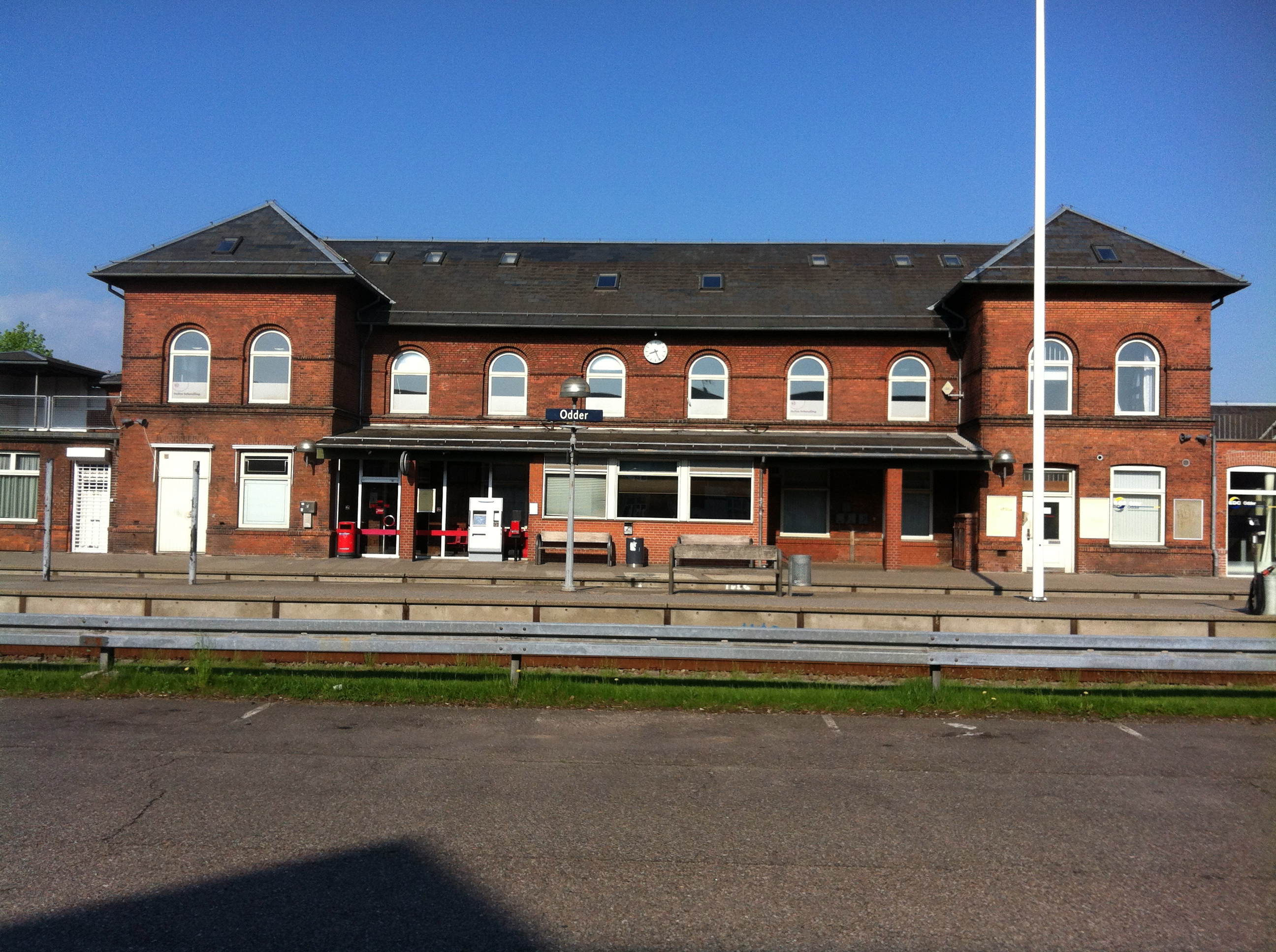 Odder Station